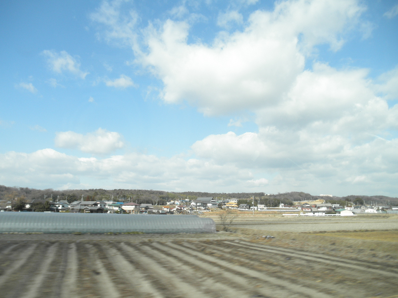 兵庫県神戸市西区平野町西戸田